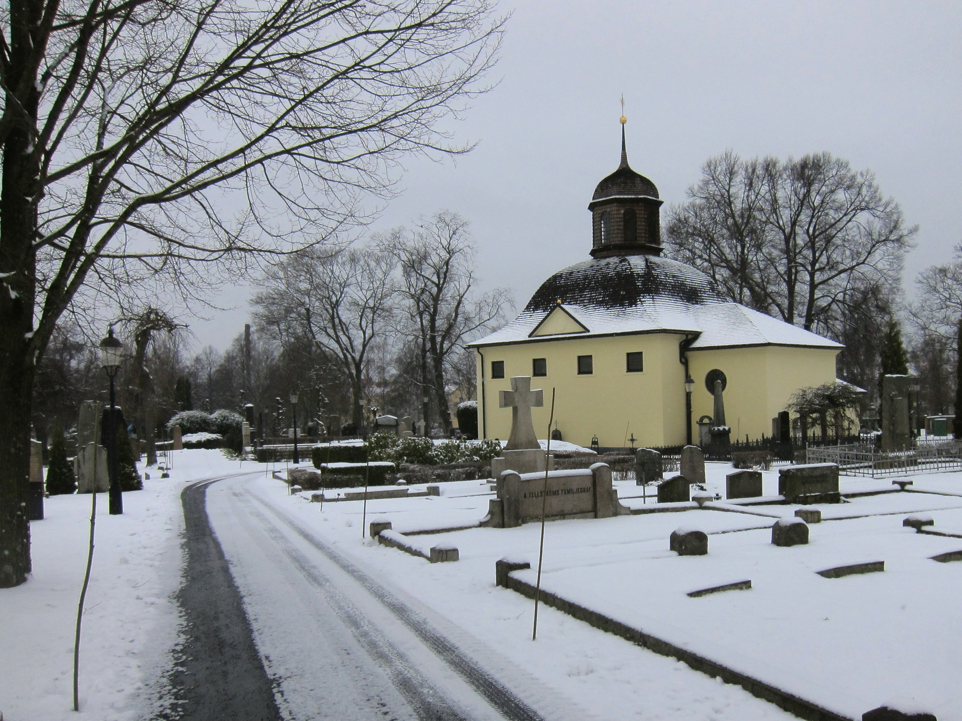 Östra kyrkogården i Jönköping. Östra kapellet syns också på bilden.